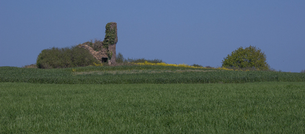 Moulin de type "petit-pied" des Côtes-d'Armor construit en 1866